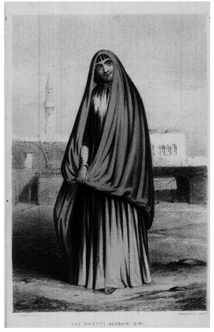 Illustration